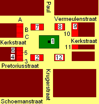 Inrichting van het Kerkplein: 1: Standbeeld van Paul Kruger 2: Oude regeringsgebouw 3: Oud Capitooltheater 4: Oude Nederlandse Bank 5: Law Chambers 6: Café Riche 7: Paleis van Justitie 8: Oude Reservebank en Old Mutual-gebouw 9: Ons Eerste Volksbank 10: Eerste Nasionale Bank 11: Tudorgebouw 12: Standard Bank A: hoofdpostkantoor B: Oude Muntgebouw C: Bank van Afrika